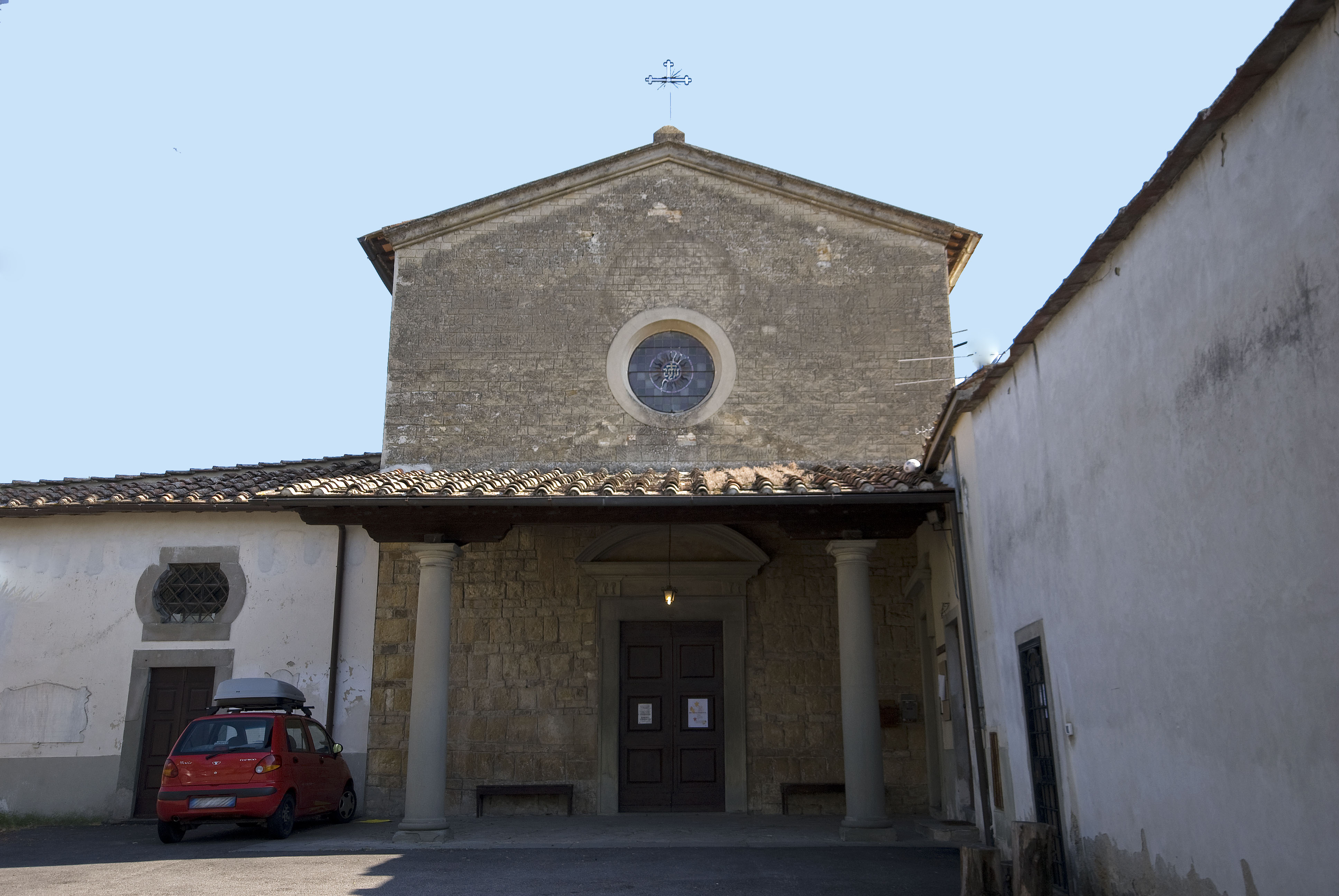 chiesa di san lorenzo alle rose (Impruneta)